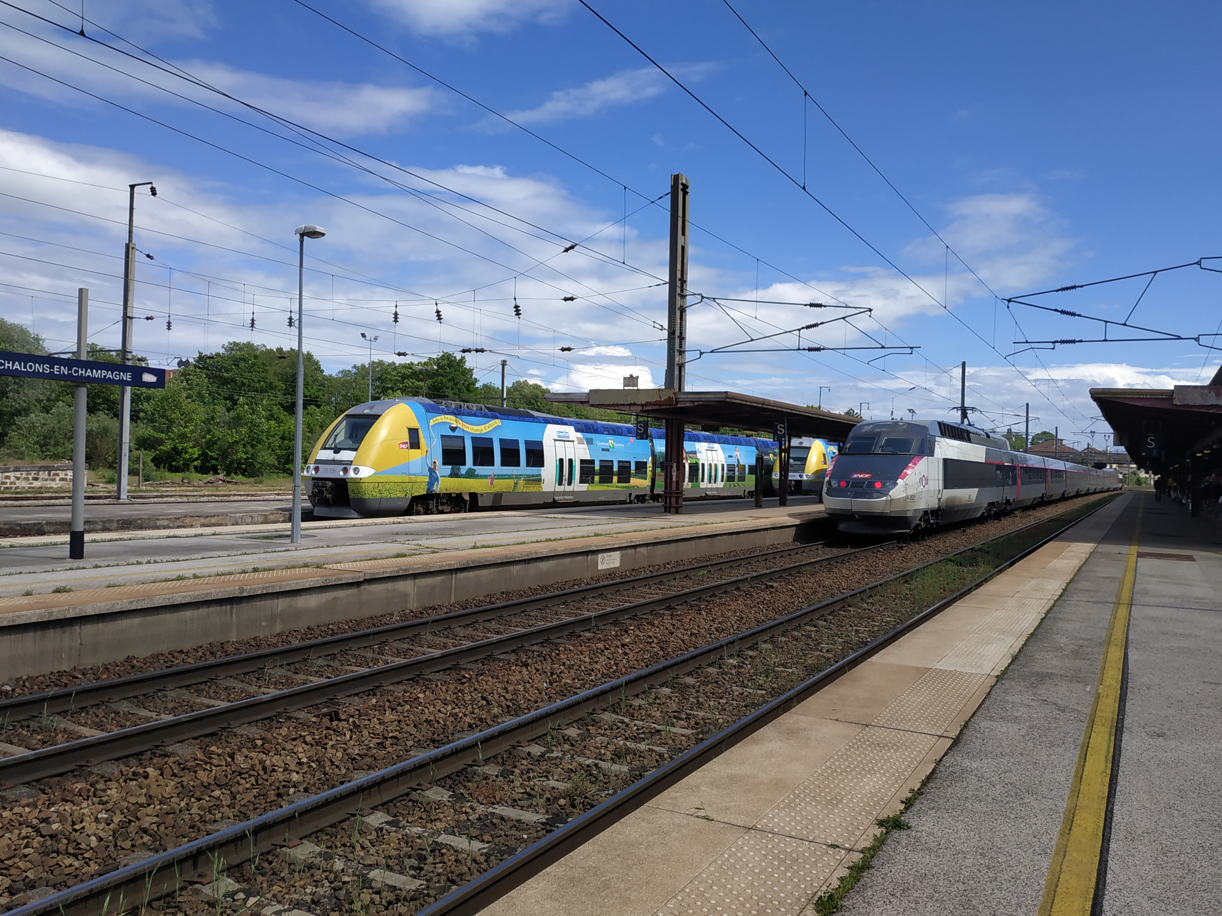 TER & TGV en gare de Châlons-en-Champagne